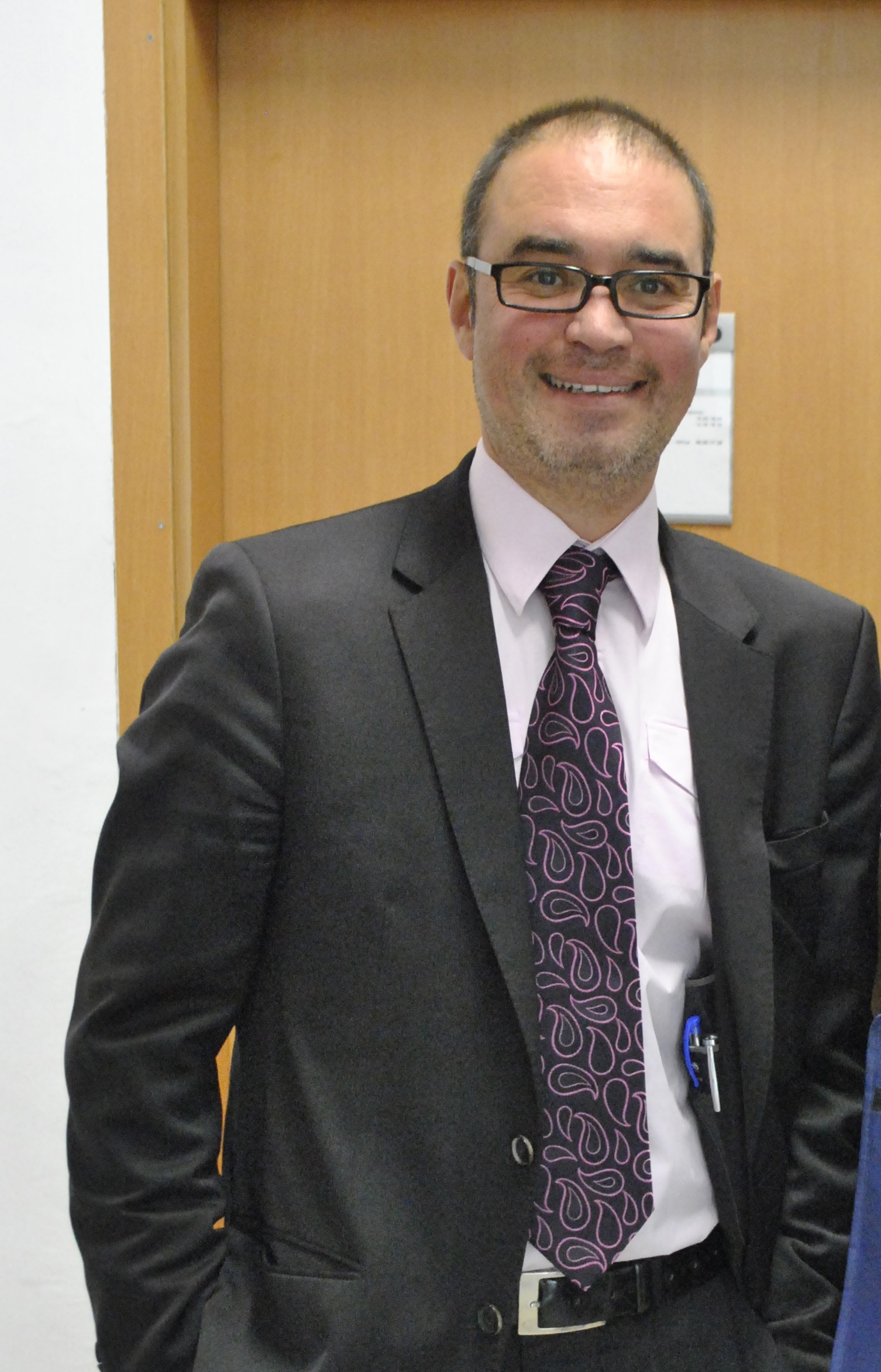 Кристиян Хаджиев